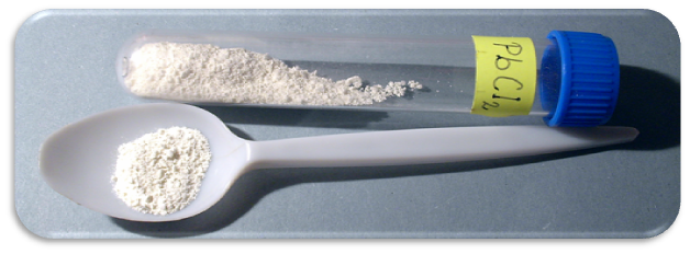 Clorid olovnatý - PbCl2